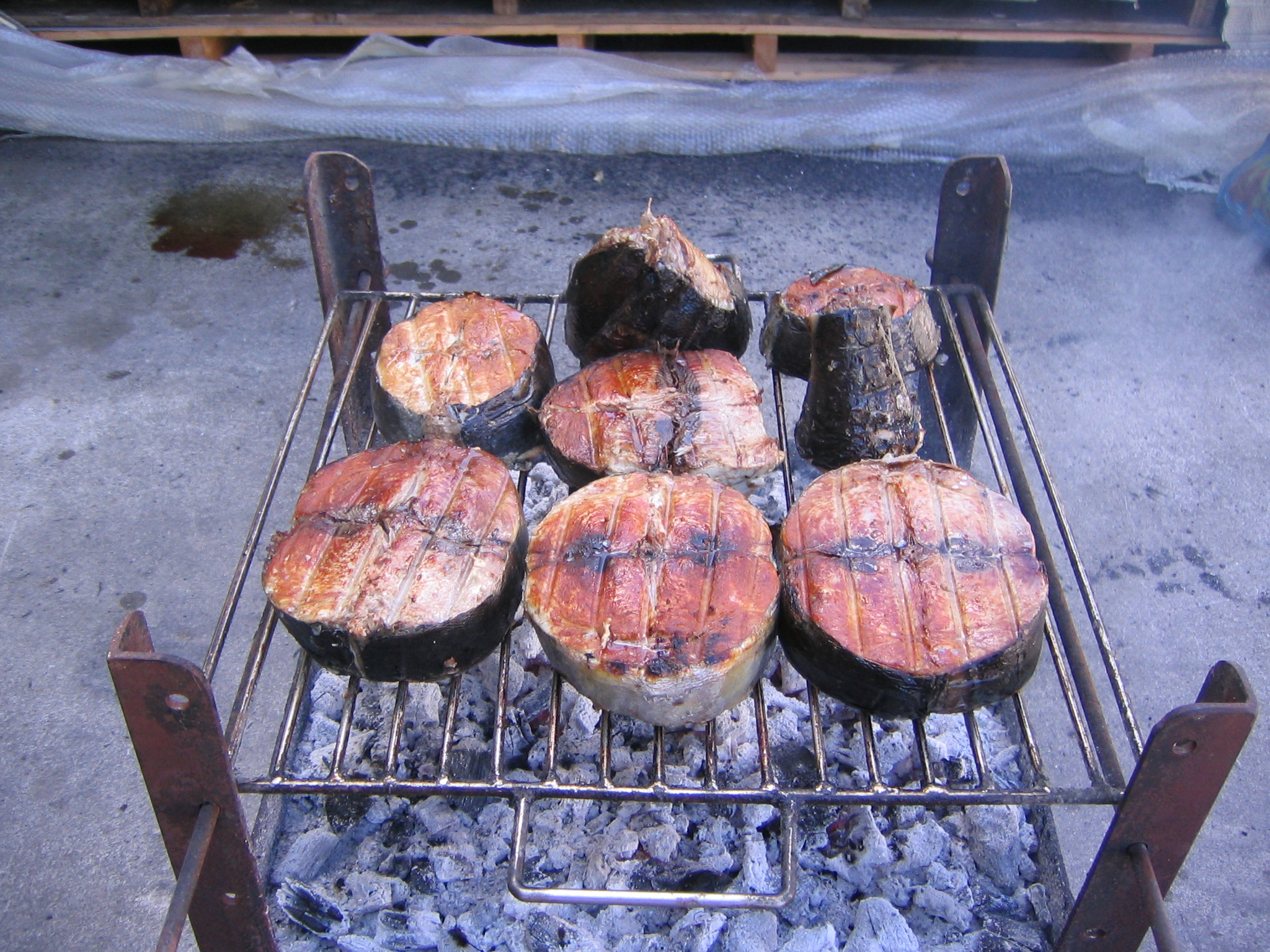 Preparación de bonito del norte a la parrilla. Gastronomía típica de la localidad vasca de Ondárroa.